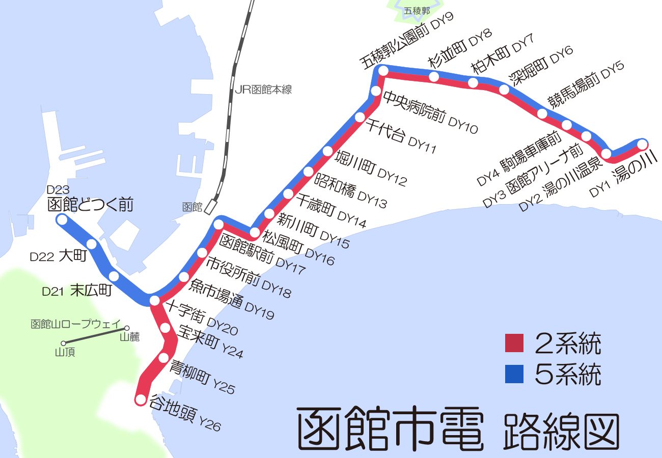 函館市電の路線図